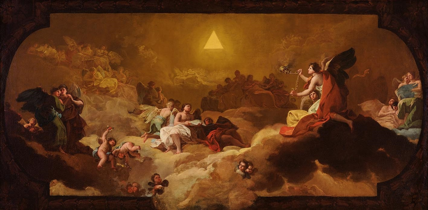 Esta obra es un boceto preparatorio del fresoo similar que Francisco de Goya y Lucientes pintó en una de las bóvedas de la Catedral-Basílica de Nuestra Señora del Pilar de Zaragoza, donde aún se conserva ese fresco.